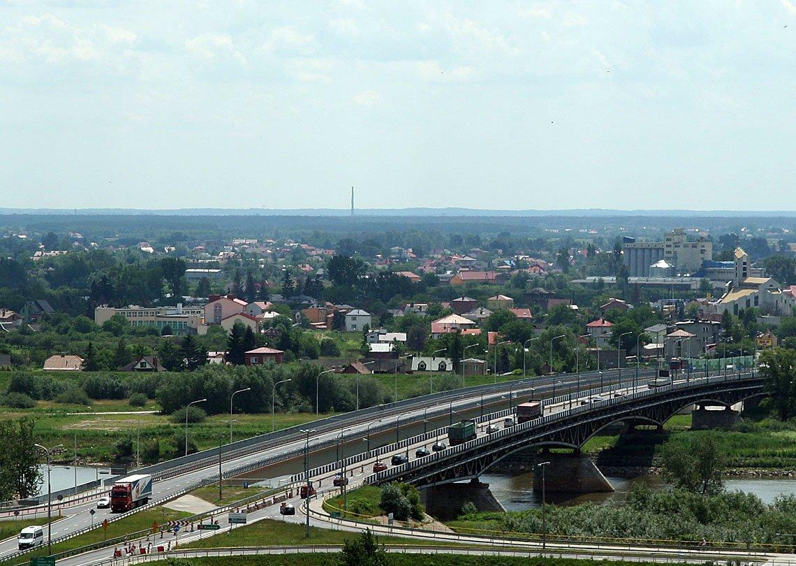 Most na Wiśle i fragment prawobrzeżnej części Sandomierza